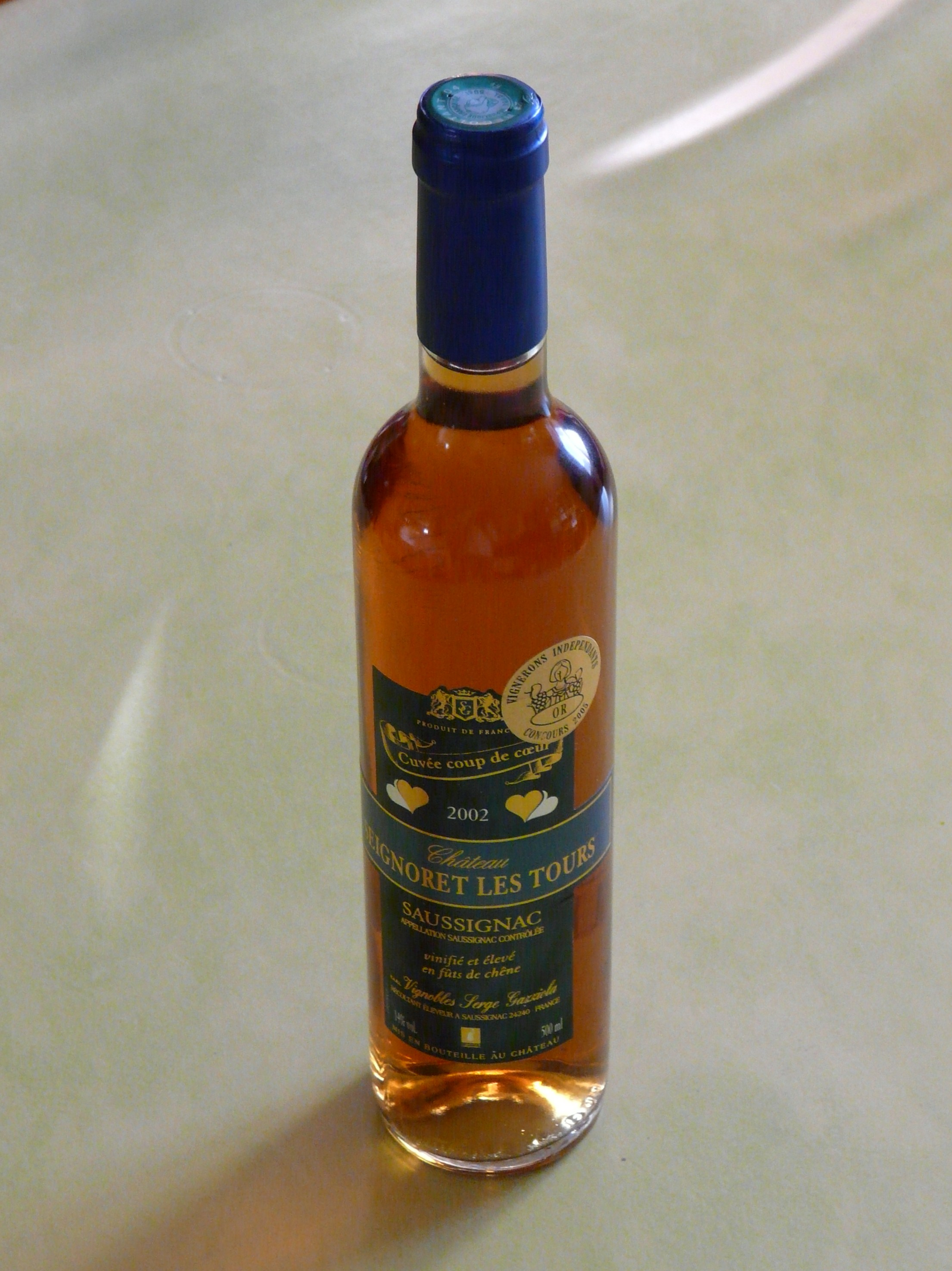 Bouteille de 50 cl de saussignac 2002.